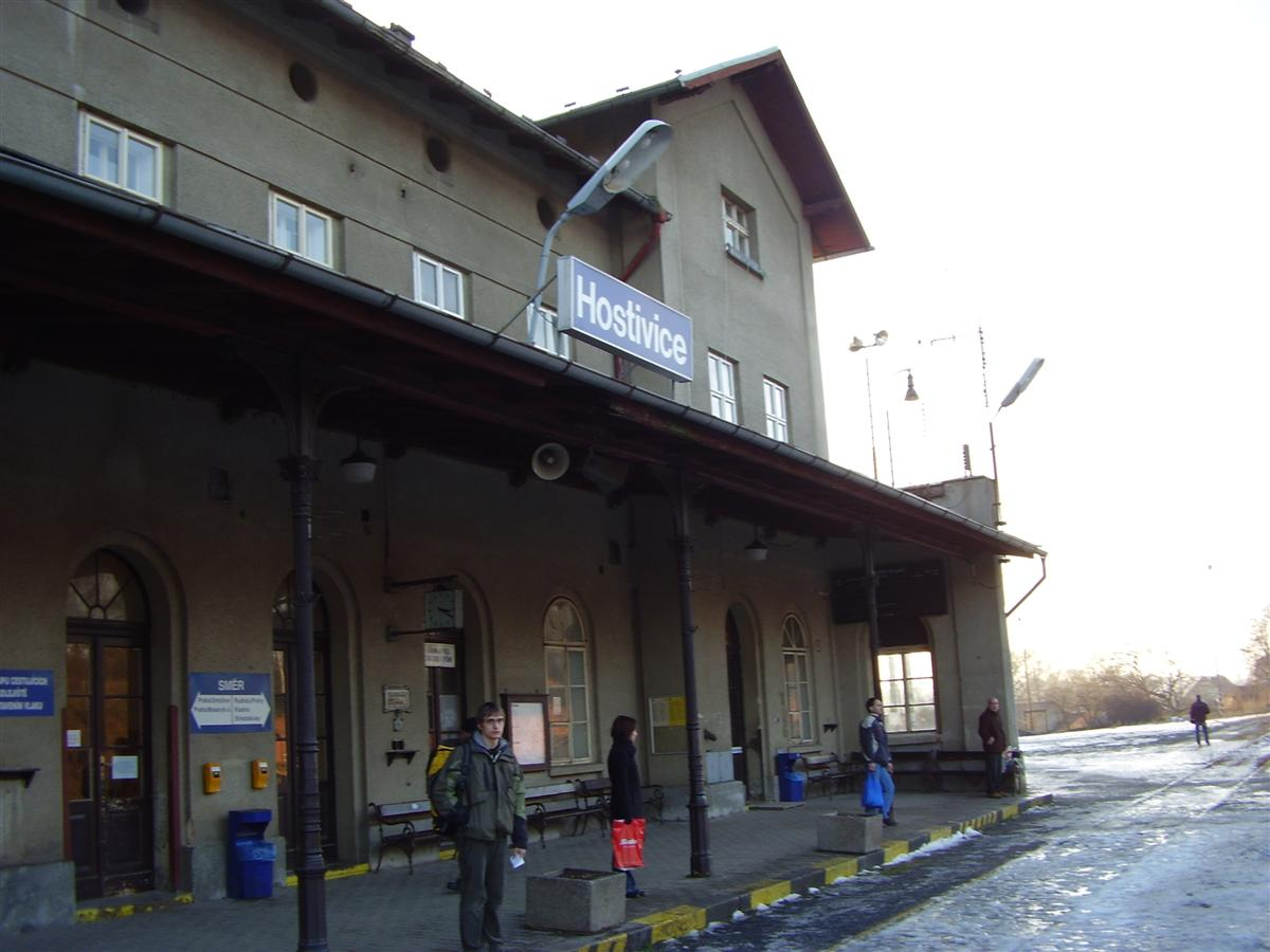 Nádraží Hostivice (okres Praha-západ)